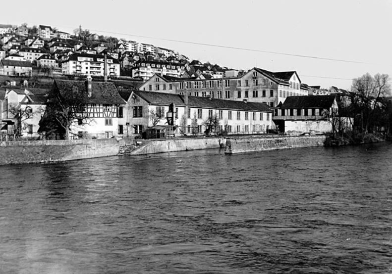 ehemalige Seidenweberei Baumann älter, Zürich-Höngg ZH, Schweiz